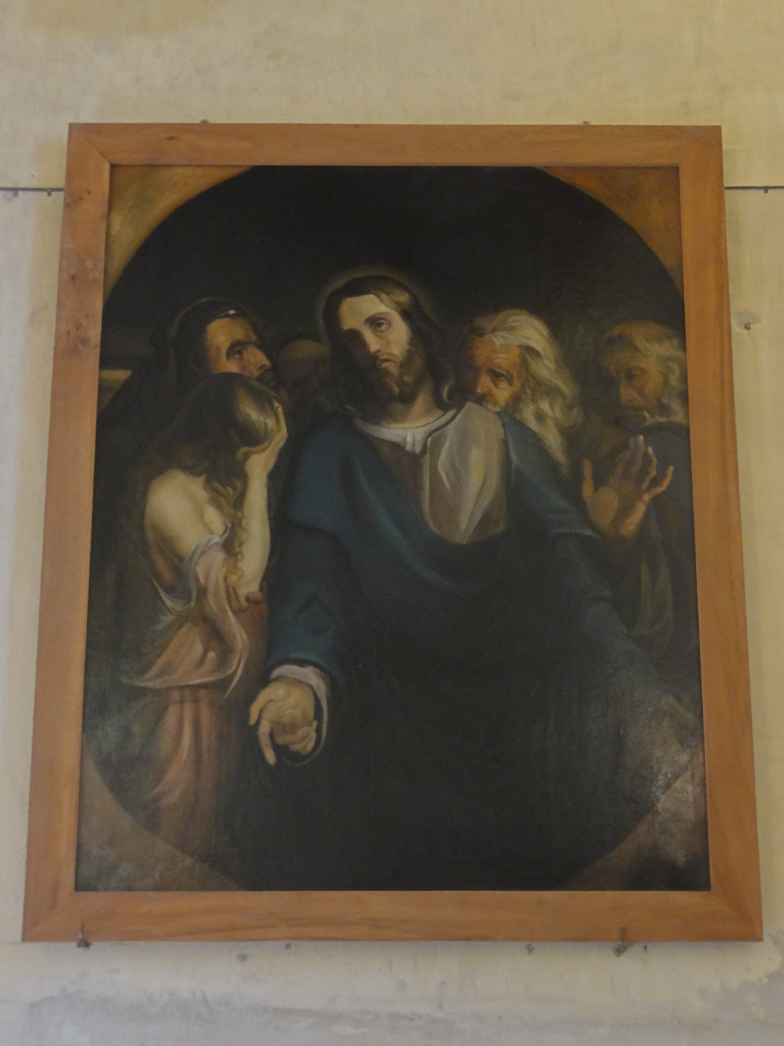 Tableau - le Christ et la femme adultère, ou le Christ entre quatre disciples.